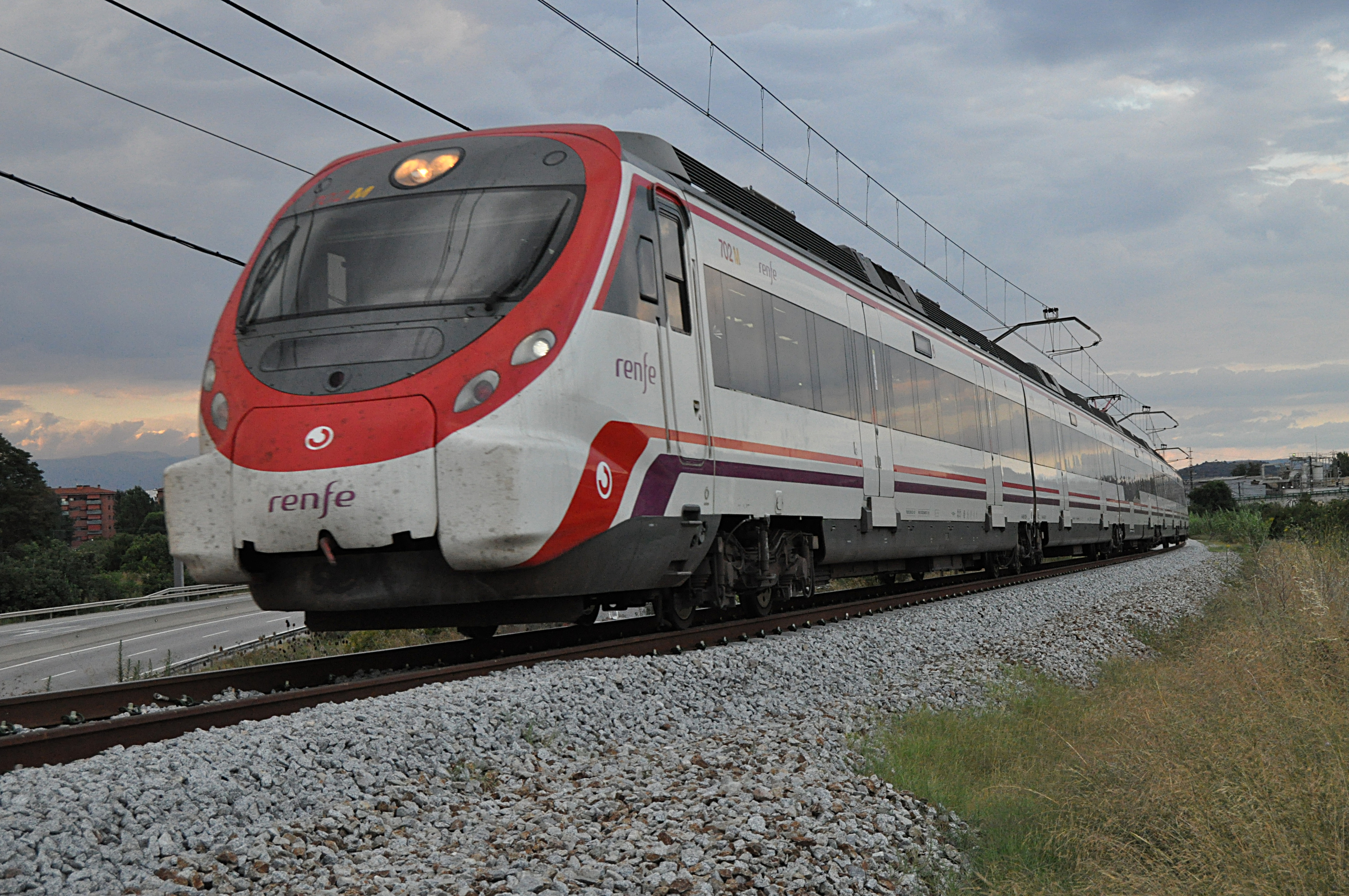 Un automotor eléctrico Civia de Renfe Operadora, prestando un servicio R8 de Rodalies de Catalunya, por los primeros metros de la línea 246 de Adif de Mollet-Sant Fost a Castellbisbal-Agujas Rubí, después de salir de la estación de Mollet - Sant Fost, justo antes de cruzar el puente sobre la autovía C-17 (Mollet del Vallès, comarca del Vallès Oriental, provincia de Barcelona, Catalunya).